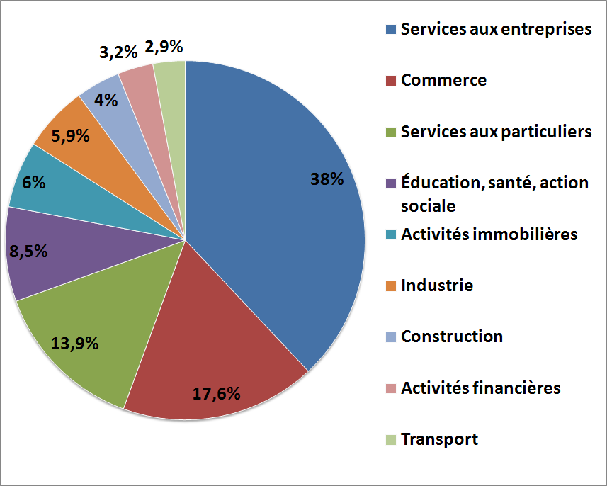 Répartition des entreprises boulonnaises (Boulogne-Billancourt) dans les différents secteurs d'activité en janvier 2005. Chiffres communiqués par l'Insee consultables sur le site de la mairie de Boulogne-Billancourt : (page consultée le 3 mars 2008)